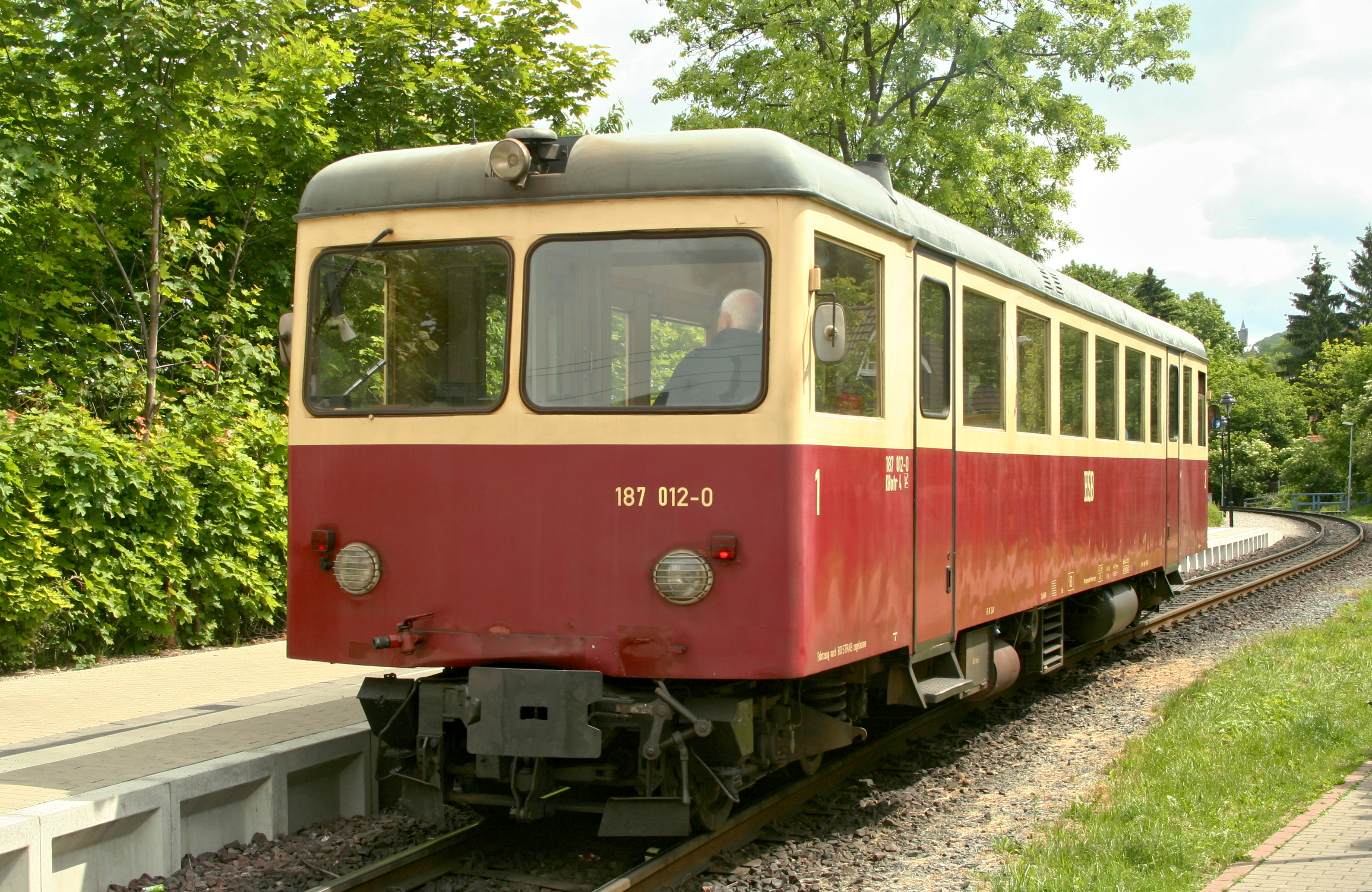 Dieseltriebwagen 187 012 der HSB (ex Langeoog T 3 ex WEG T 35 ex MEG T 15) Fuchs 9107/1955, B’B’ dh, am Haltepunkt Wernigerode Hochschule Harz (früher Wernigerode Kirchstraße) am 08. Juni 2012